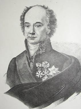 Gowin de Stassart, homme politique et écrivain belge